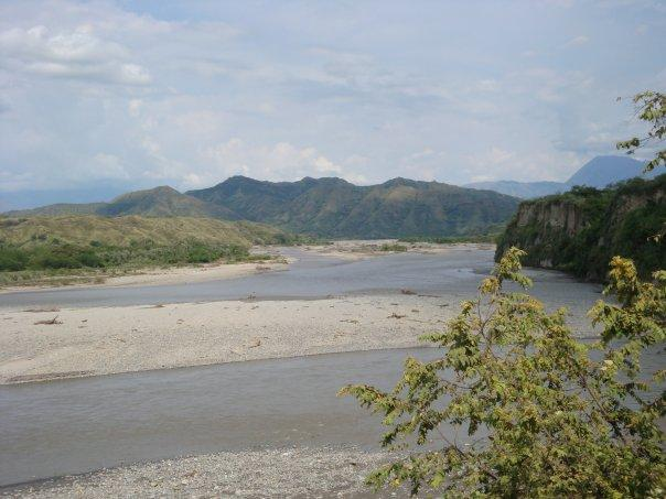 Río Guachicono y de fondo la espesura del Valle del Patía